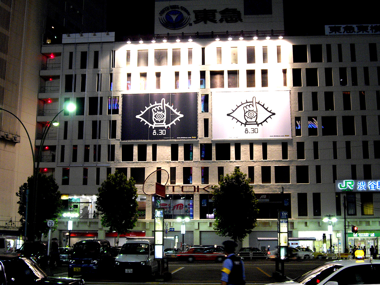 かっこいい！知らない人には意味不明だけど、知ってる人にはすごいインパクト！ライトアップの仕方も効いてる 20th Century Boys